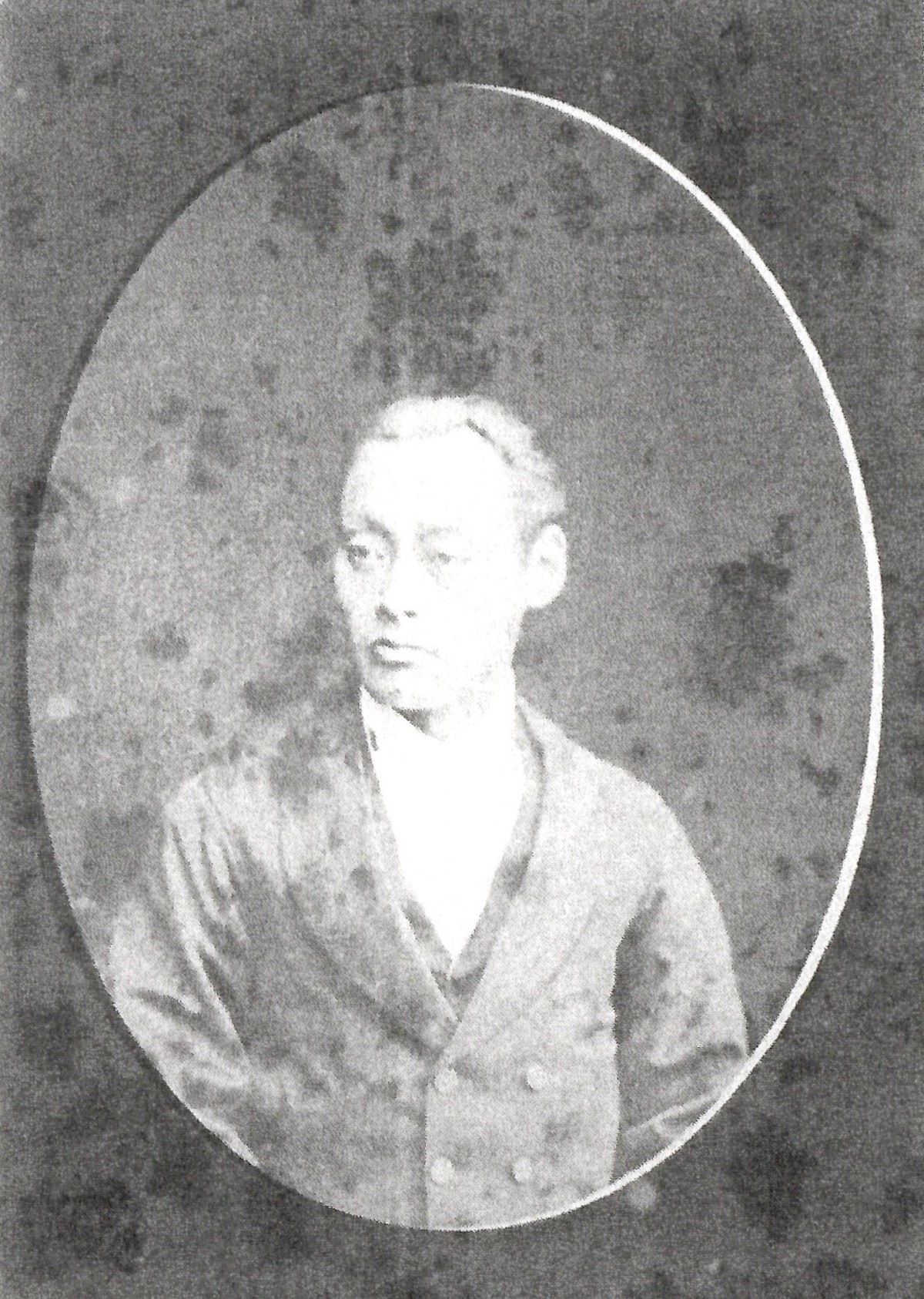 堀直賀の肖像写真。